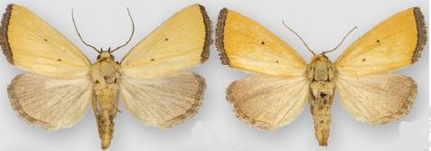 Marimatha nigrofimbria male (right) female (left)